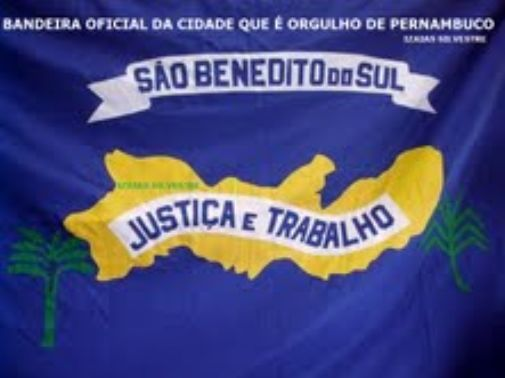 Bandeira De São Benedito do Sul